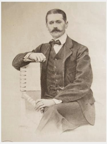 Portrait photogravé du patron de presse français Pierre Lafitte (1872-1938).